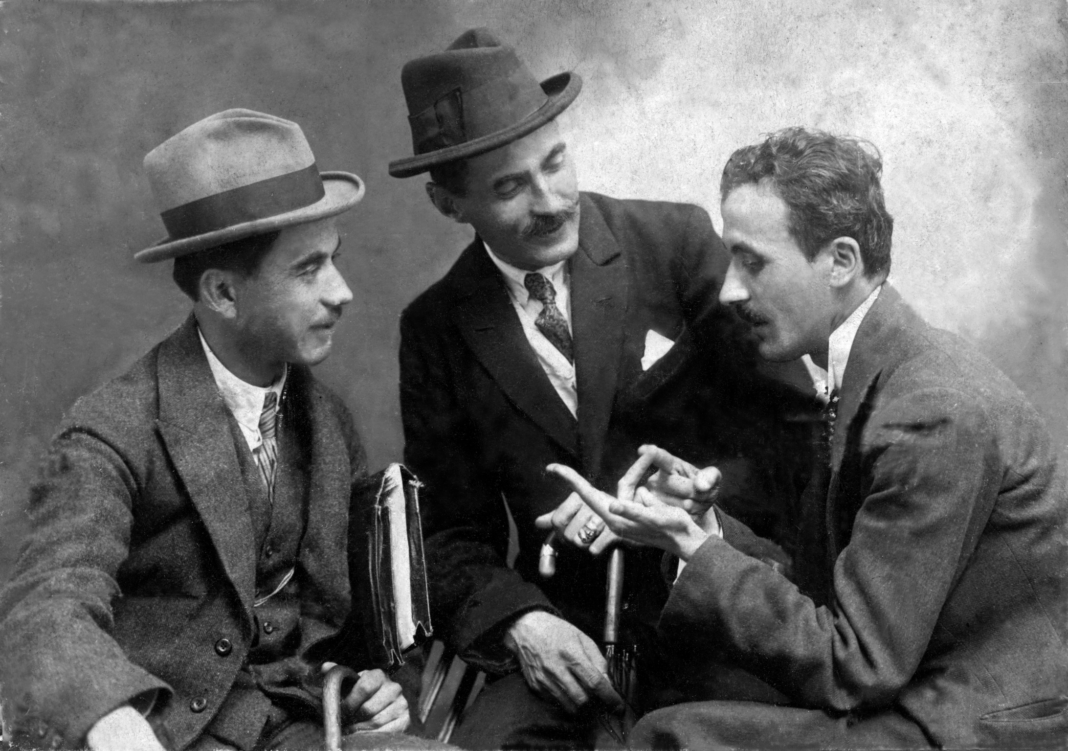 Сергей Ст.Иванов (в средата) с колеги - 1916г.